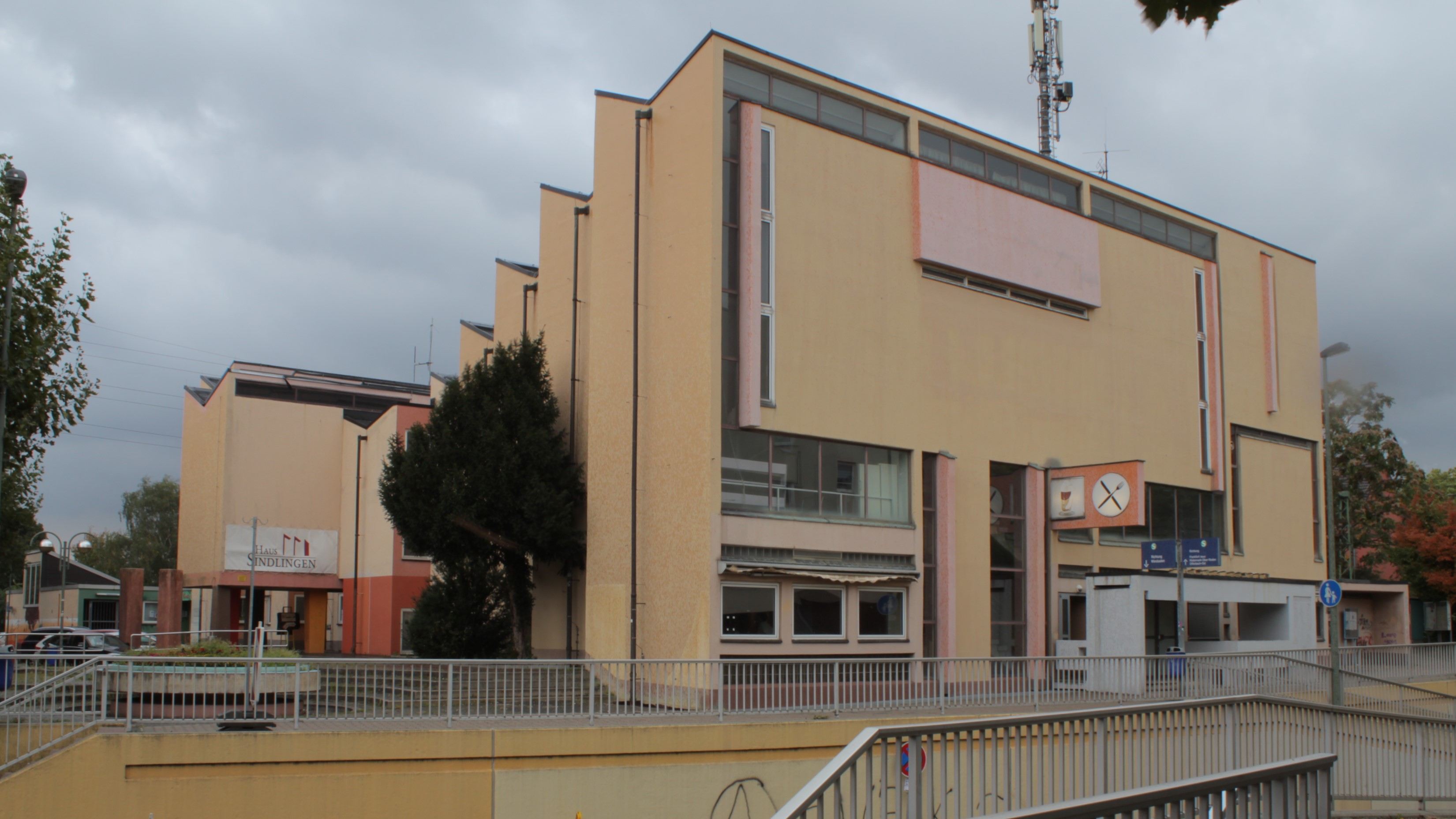 Strassenansicht